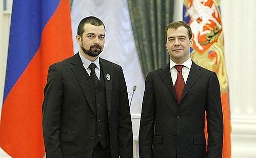 Михаил Геннадьевич Ревнивцев